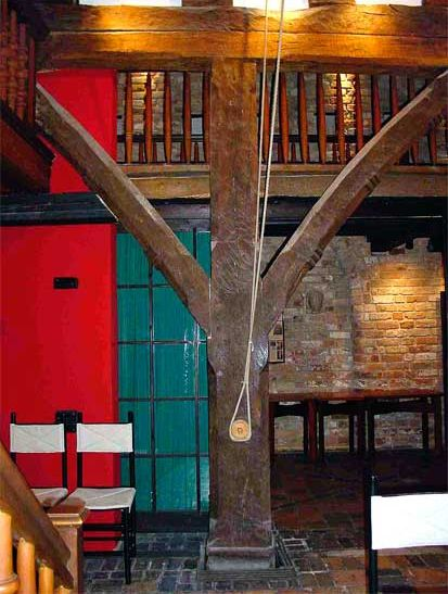 Der Hausbaum des Hauses der Architekten in der Wokrenter Straße 40, Rostock